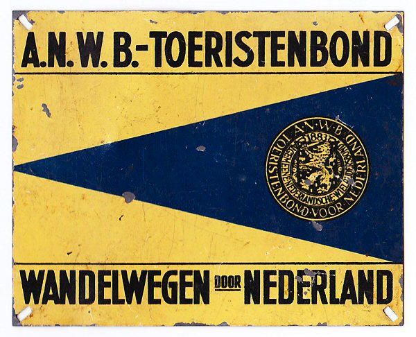 ANWB Bondswandelweg routemarkering heenweg, 1918-37. Blauwe pijl op wit met zwarte tekst (geverfd; vergeeld) op zink, ca. 10x8 cm. Voor de eerste vier wandelweg routes (Amsterdam-Arnhem (1914), Arnhem-Deventer (1915), Zwolle-Oldenzaal (1916) en Heerenveen-Assen (1917)), werd aanvankelijk alleen voor de heenweg een routemarkering gebruikt. Deze was soortgelijk (blauwe pijl op wit), met het verschil dat i.p.v. de tekst "Wandelwegen door Nederland", de begin- en eindplaats van de wandelweg werd genoemd, of de plaats van bestemming van het desbetreffende dagtraject.